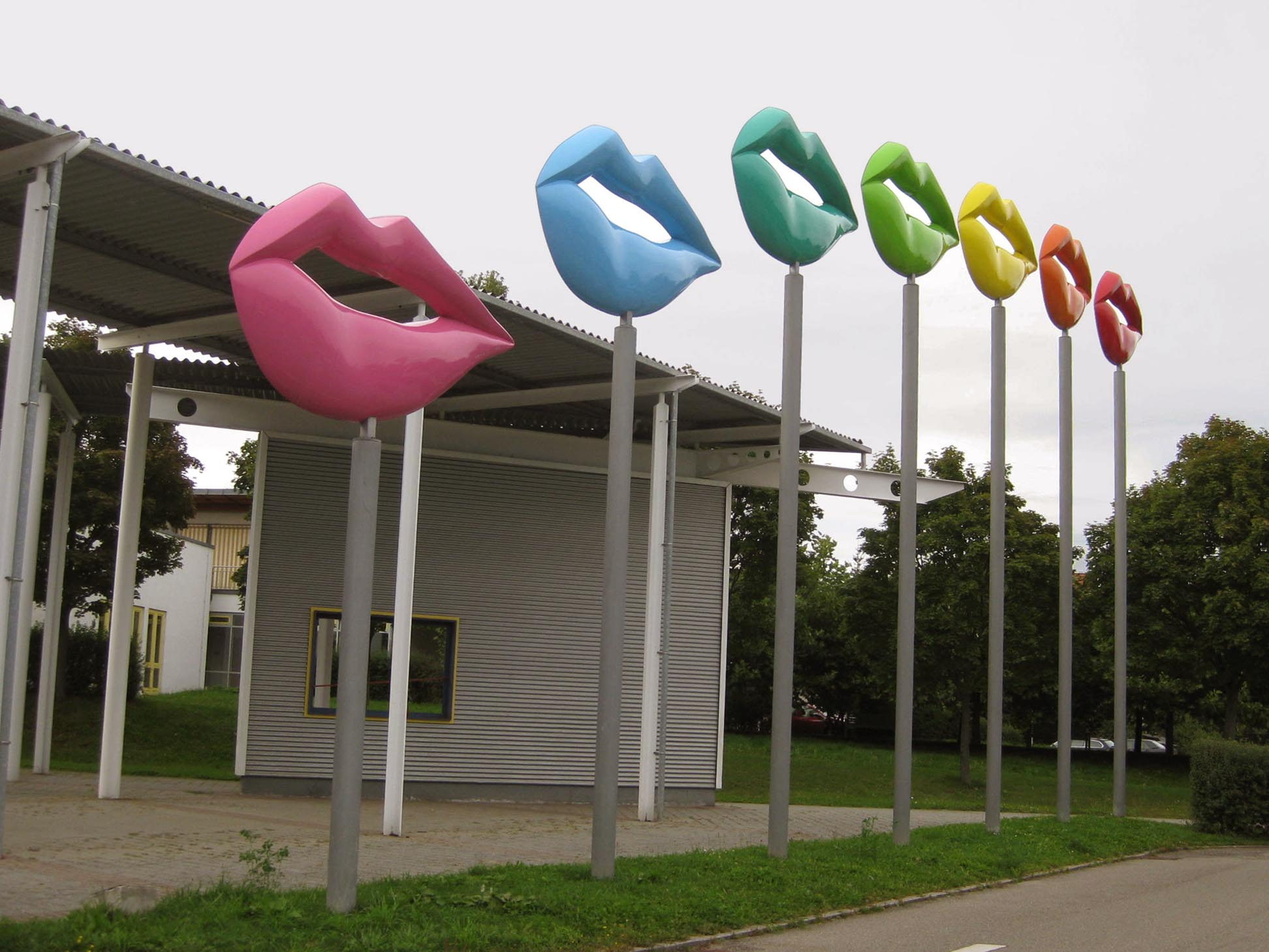 Rosalie, Im Regenbogen, 2004, - Deutschland, Baden-Württemberg, Filderstadt, Tübinger Strasse, Kultur- und Kongresszentrum FILharmonie